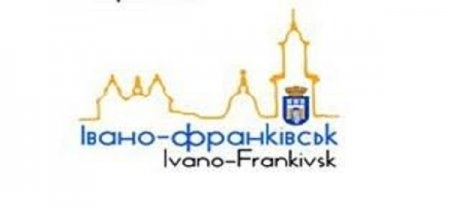 Обраний шляхом інтернет-голосування логотип міста.